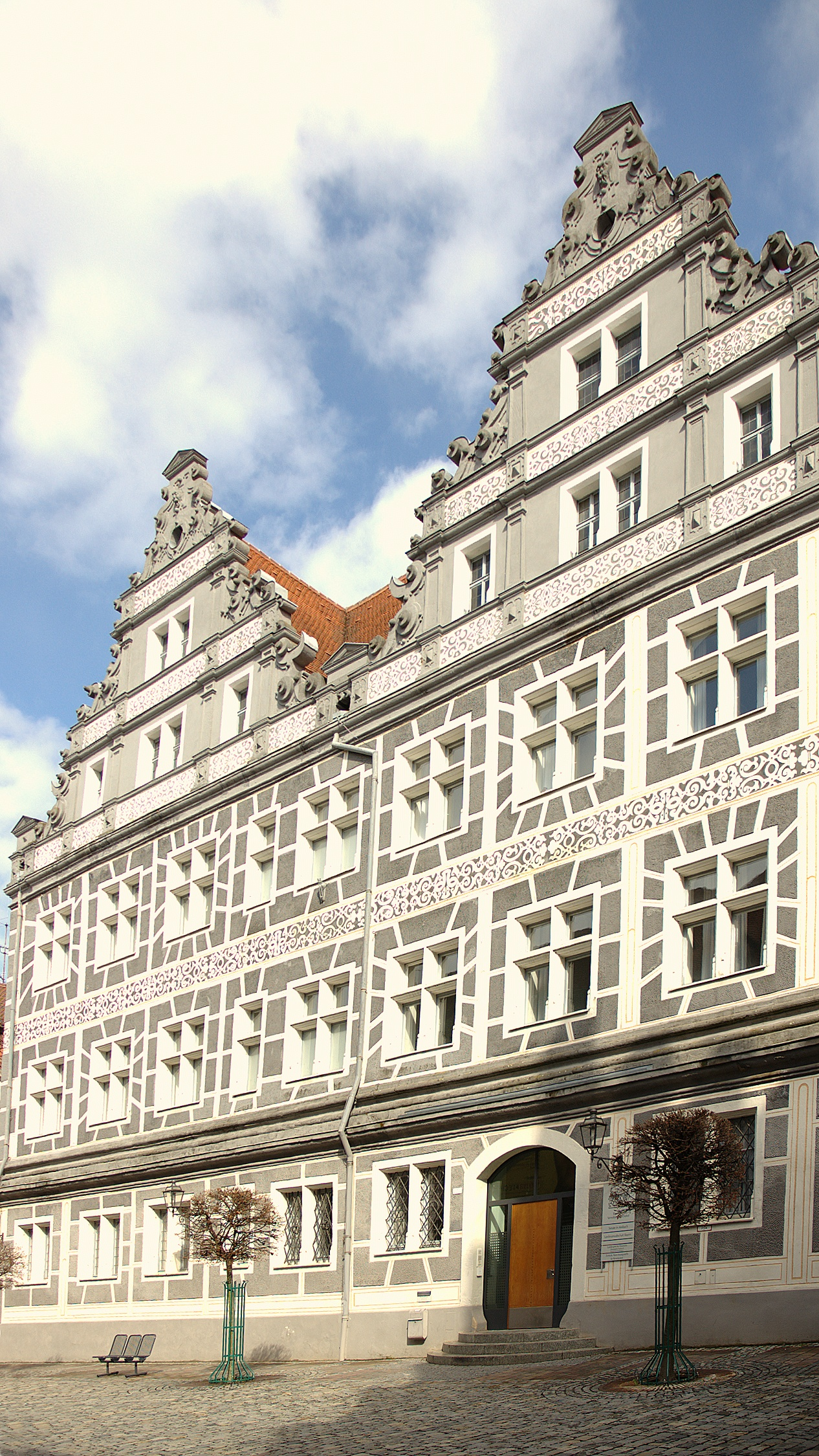 Ansbach, Westfassade der ehem. Hofkanzlei.